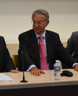 Sénateur-maire UMP de Compiègne à l'Université de Technologie de Compiègne